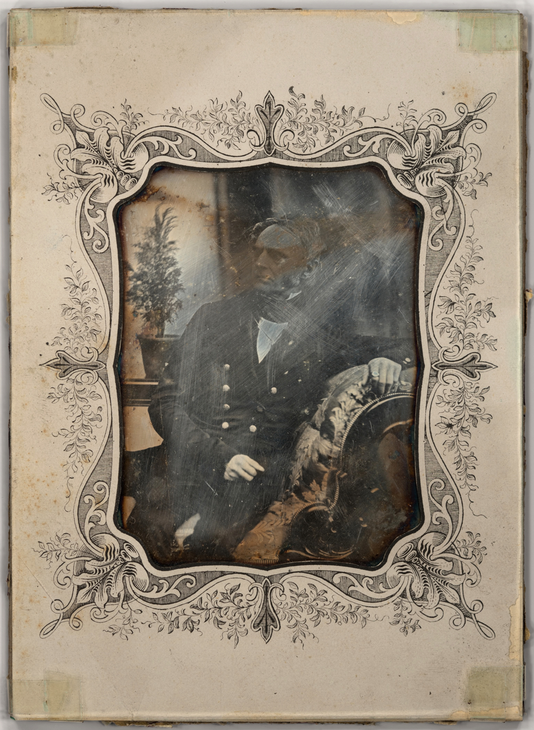 Dagerrotüüp Eesti Kirjandusmuuseumi kultuuriloolises arhiivis. Pildil on Carl Johann von Seidlitz. Daguerreobase: EKLA_B-37_1478 1840-1850